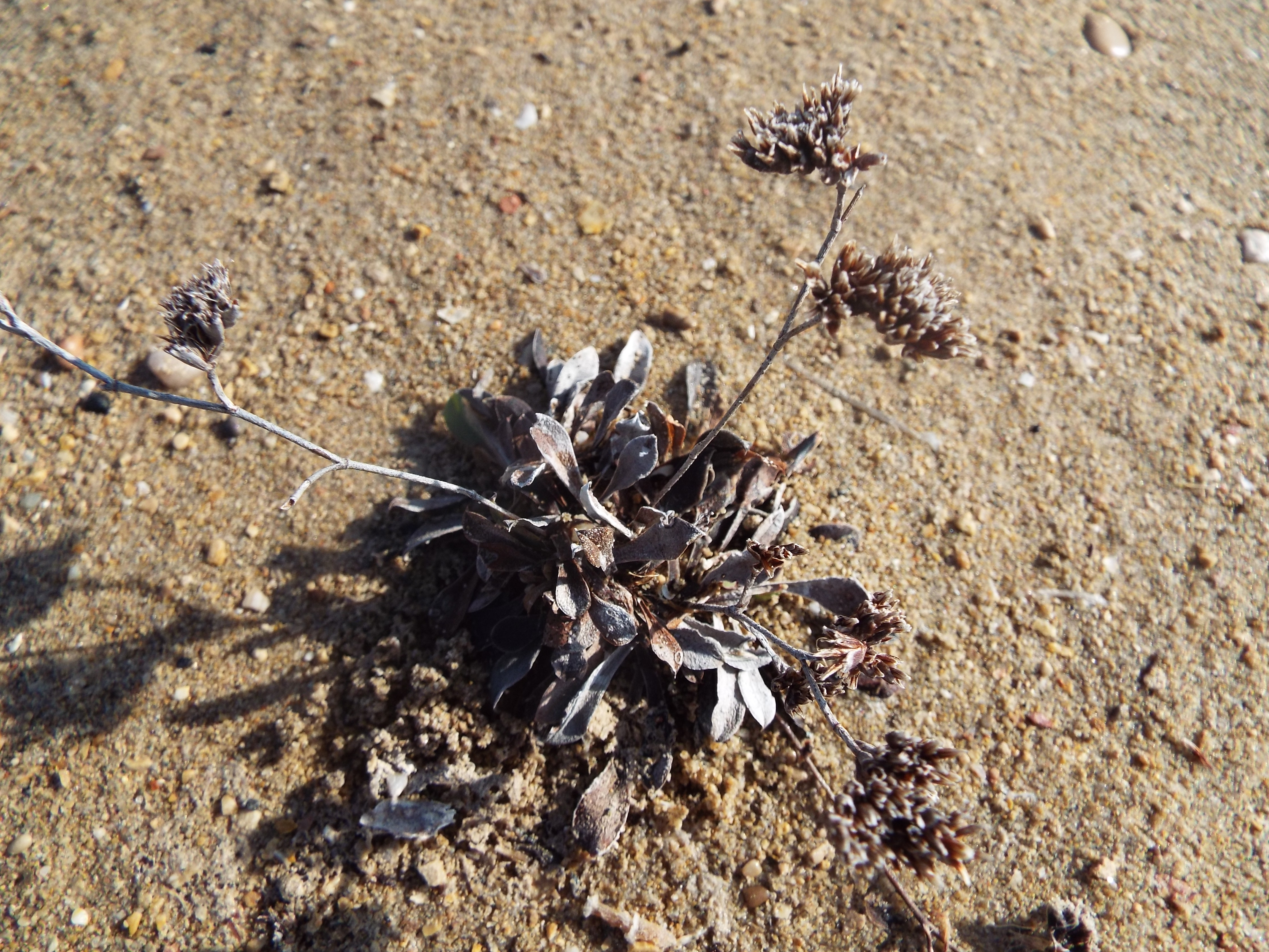 L. dufuorii fotografiado en el Parque Natural del Prado de Cabanes-Torreblanca, Castellón (Comunidad Valenciana, España)